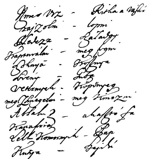 Kicsiny részlet egy 1775-ös bírósági jegyzőkönyvből, az első magyar tolvajnyelvi szójegyzék első szavai. Szövege: „Nincs viz – Ritka a’ vásár; Rajzolni – lopni; Pledezz – Szaladgy; Kaptuválni – meg fogni; Szoknya – Koßnya; Sővény – Guba; veternyek – Kőpőnyeg; meg ZSinegelni – meg Kinozni; Ablak vel Kanafria – akaßtó fa; Lelki Komornyik – Pap; Kutya – hajdú”.